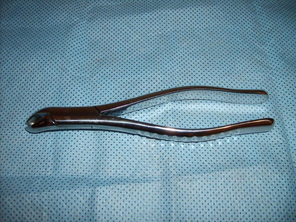 Fórceps n. 17 - utilizado em odontologia